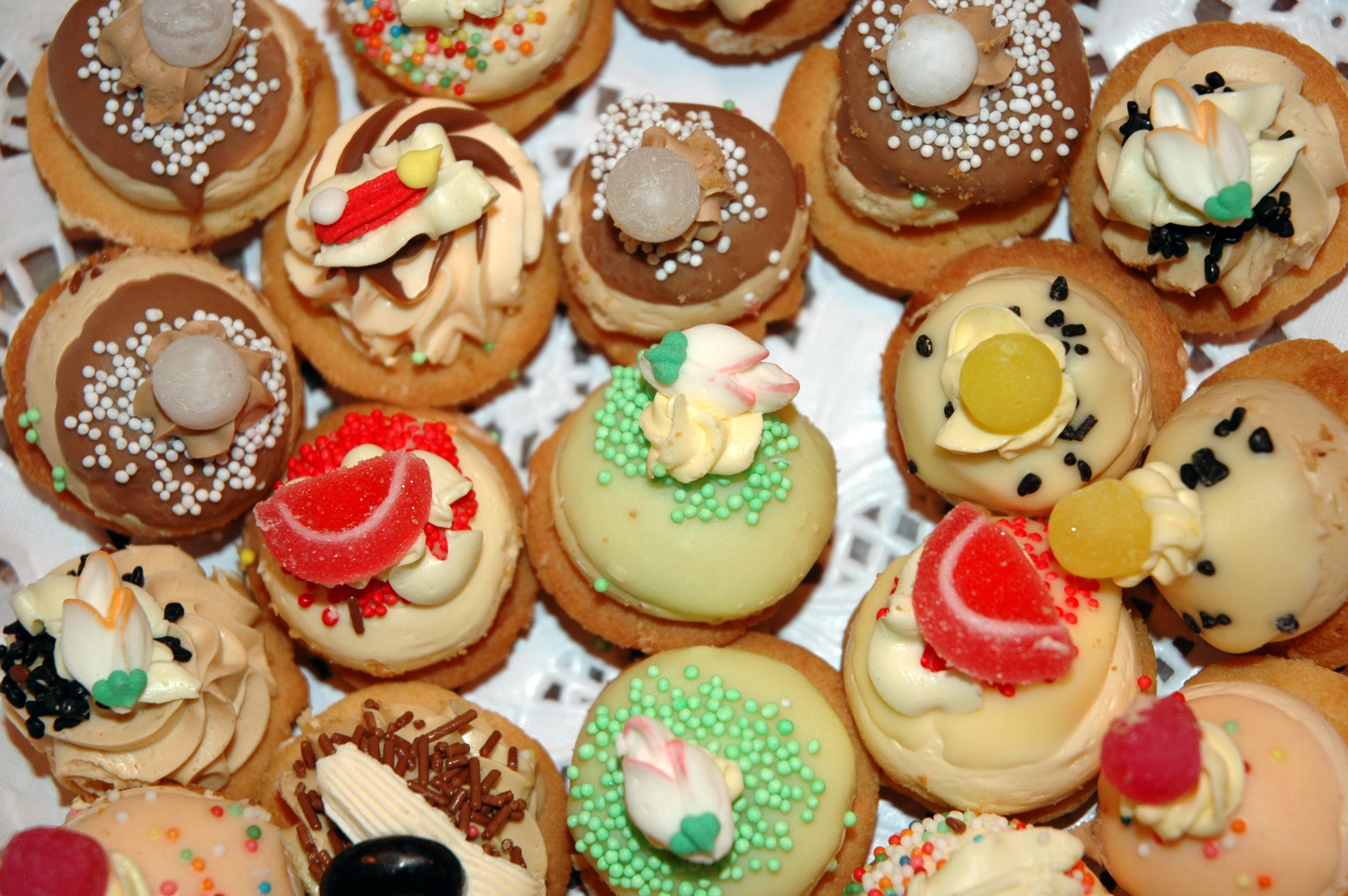 zoete kleine hapjes